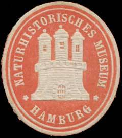 Sealing stamp Title: Naturhistorisches Museum Description: rot, weiß, geprägt Place: Hamburg size: 3x3 cm